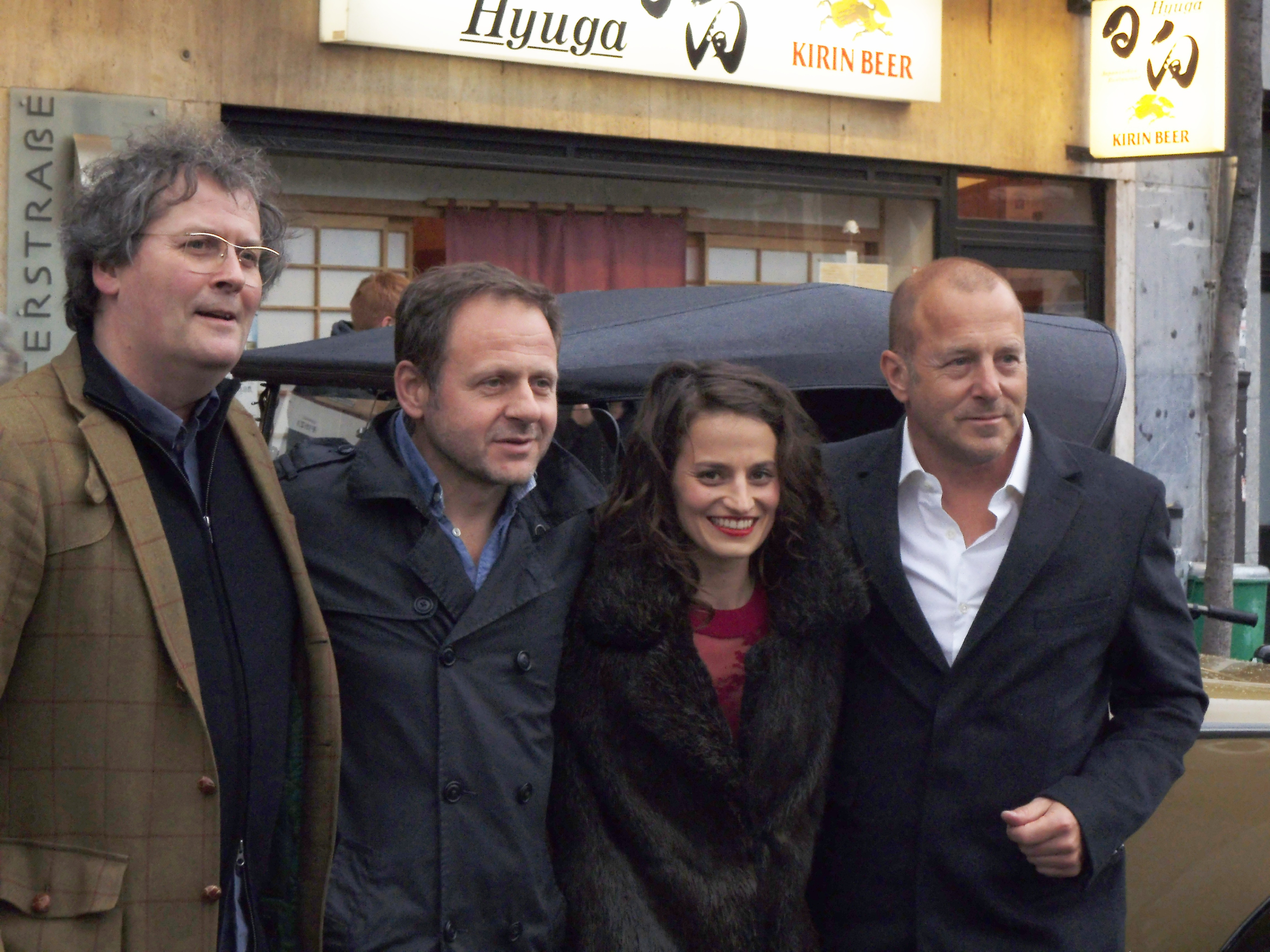 Gordian Maugg, Samuel Finzi, Lisa Charlotte Friederich und Heino Ferch bei der Premerie von "Fritz Lang – Der andere in uns" am 6. April 2016 vor dem Kino Bambi-Filmstudio in der Klosterstraße in Düsseldorf.